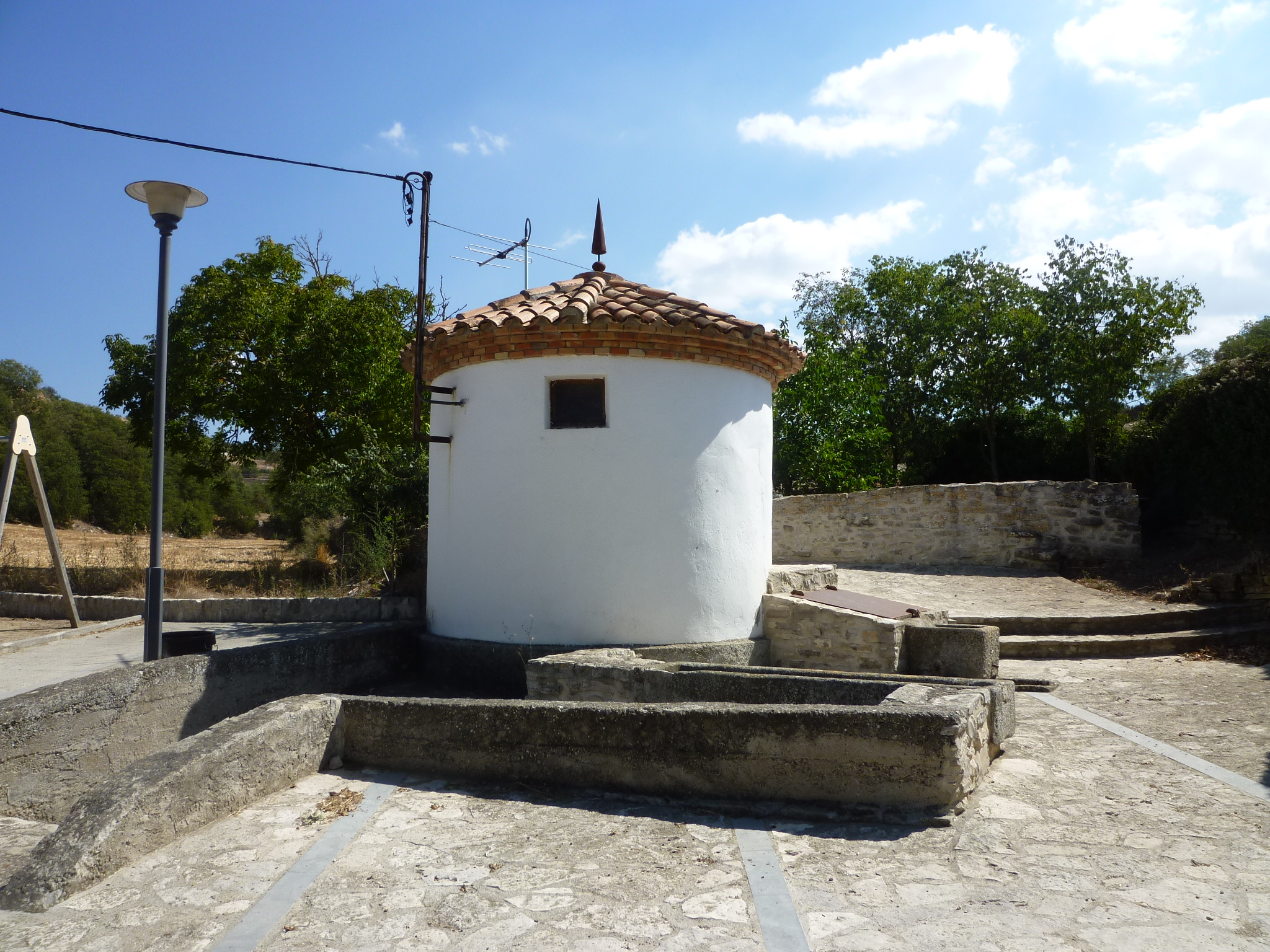 Font de Gospí (Sant Ramon): emplaçament